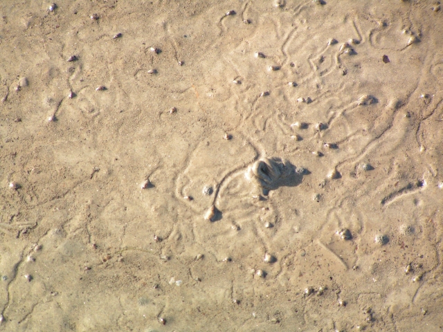 Author:M.Buschmann